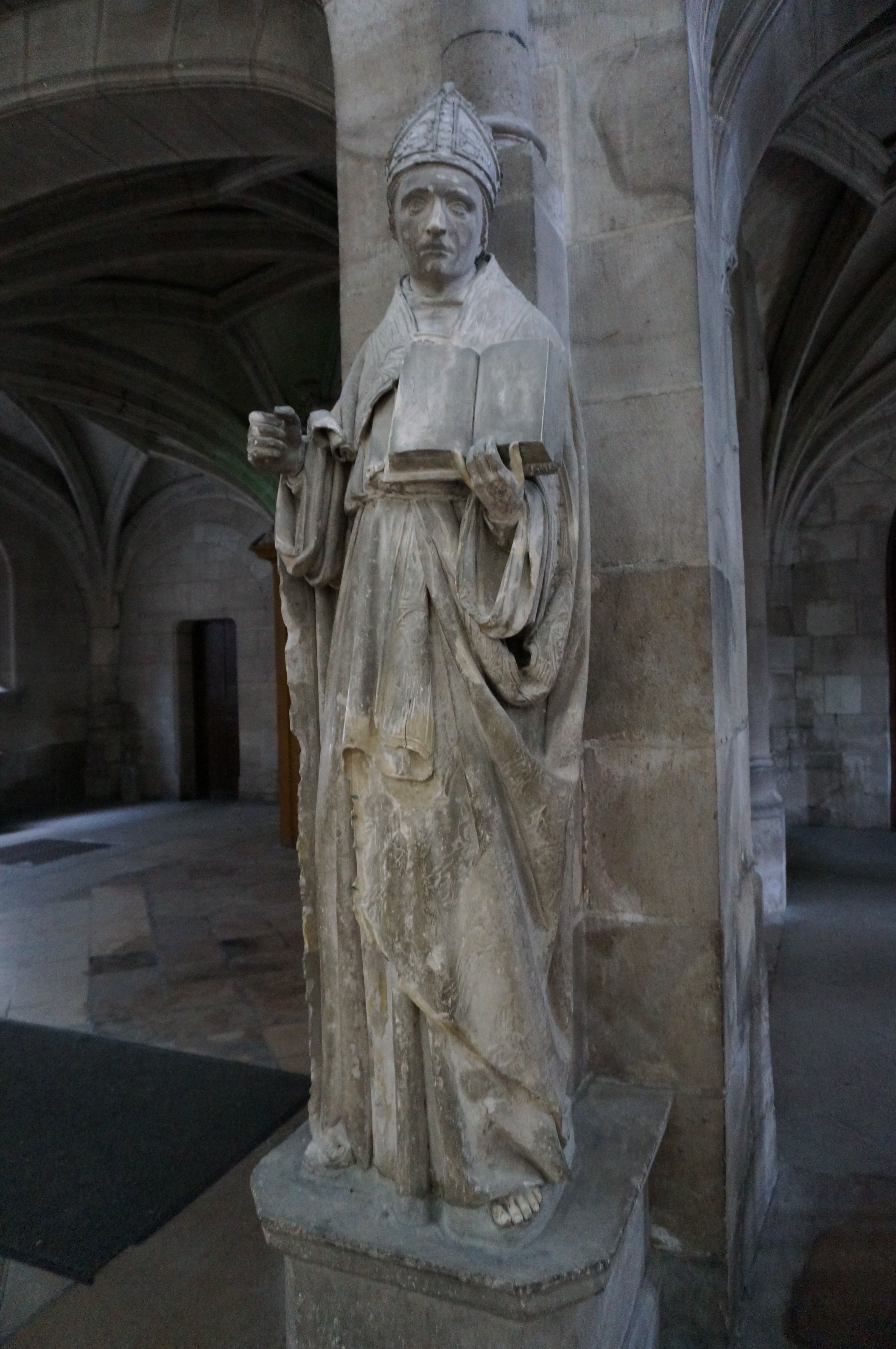 Troyes (Aube, France), église Saint-Nicolas, statue de St Bonaventure.